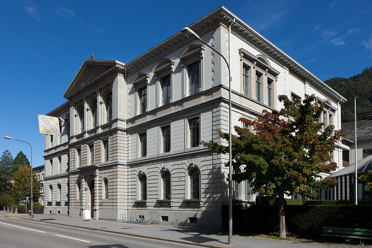 Ehemalige Höhere Stadtschule sowie Landesbibliothek und Landesarchiv in Glarus (GL)